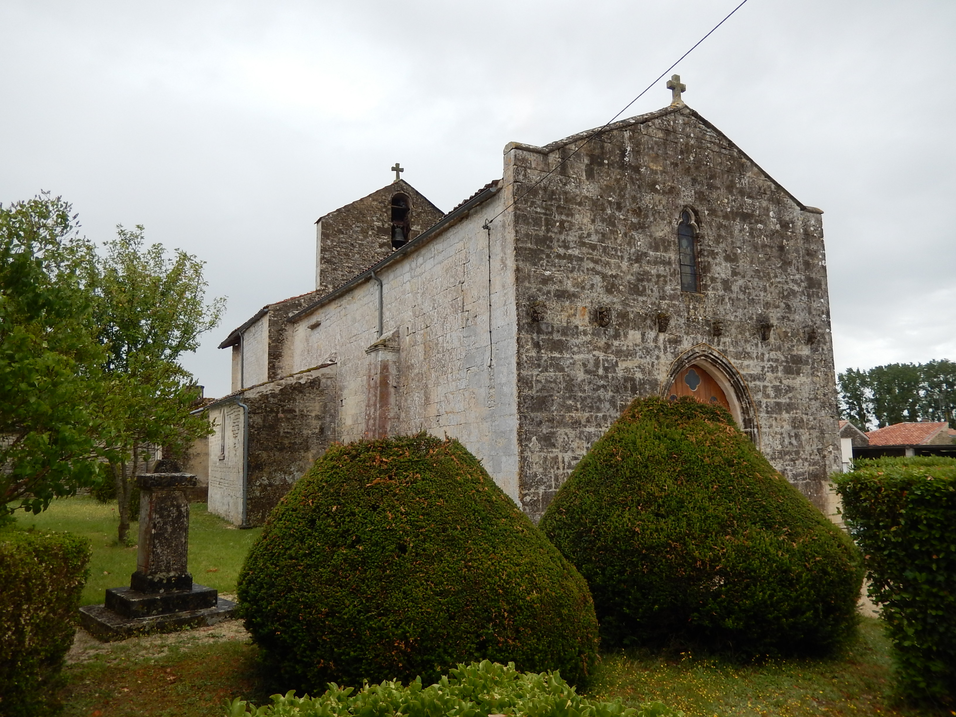 L'église Saint-Romain de Courcerac, en Charente-Maritime.